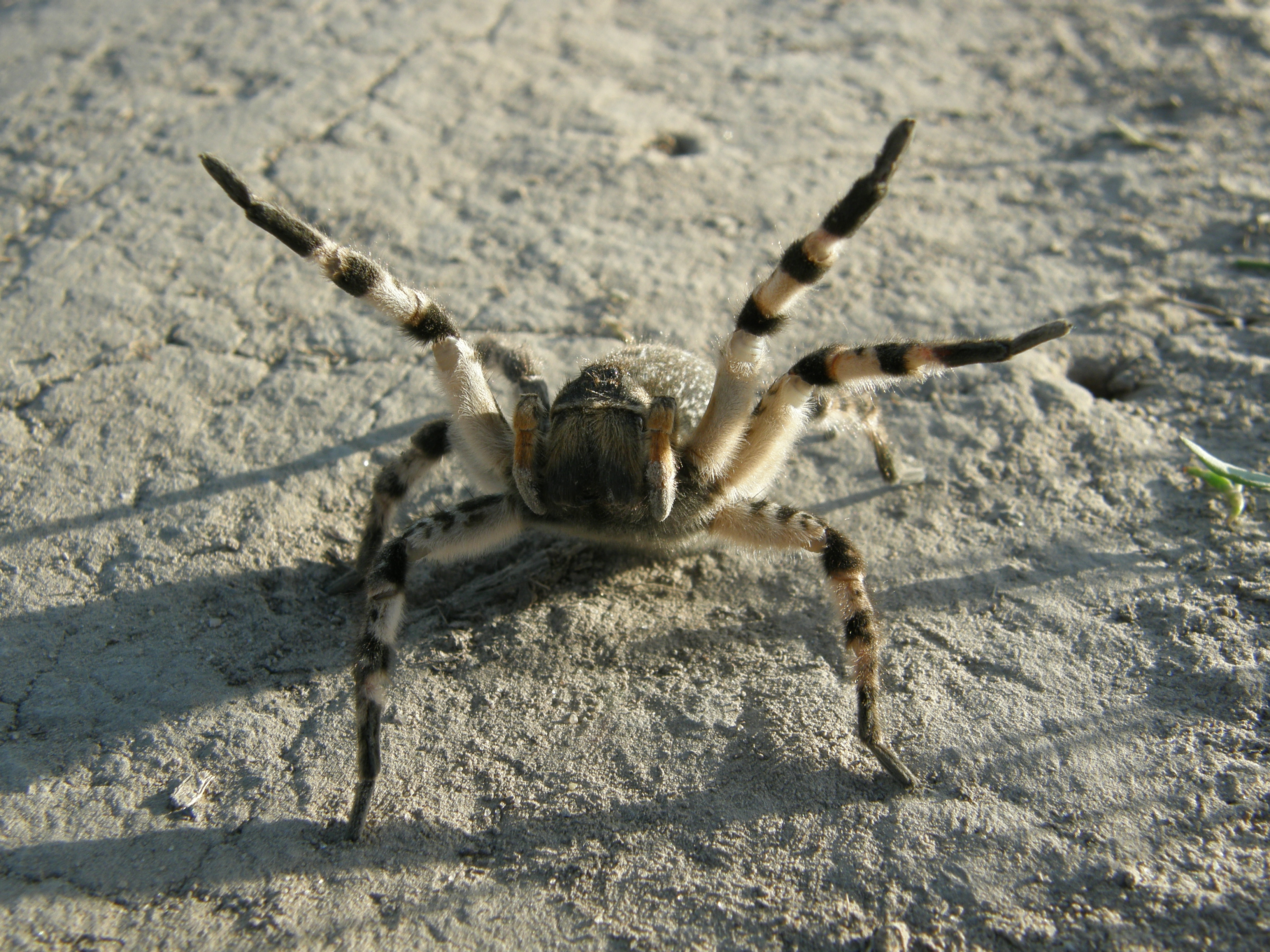 Тарантул в угрожающей позе